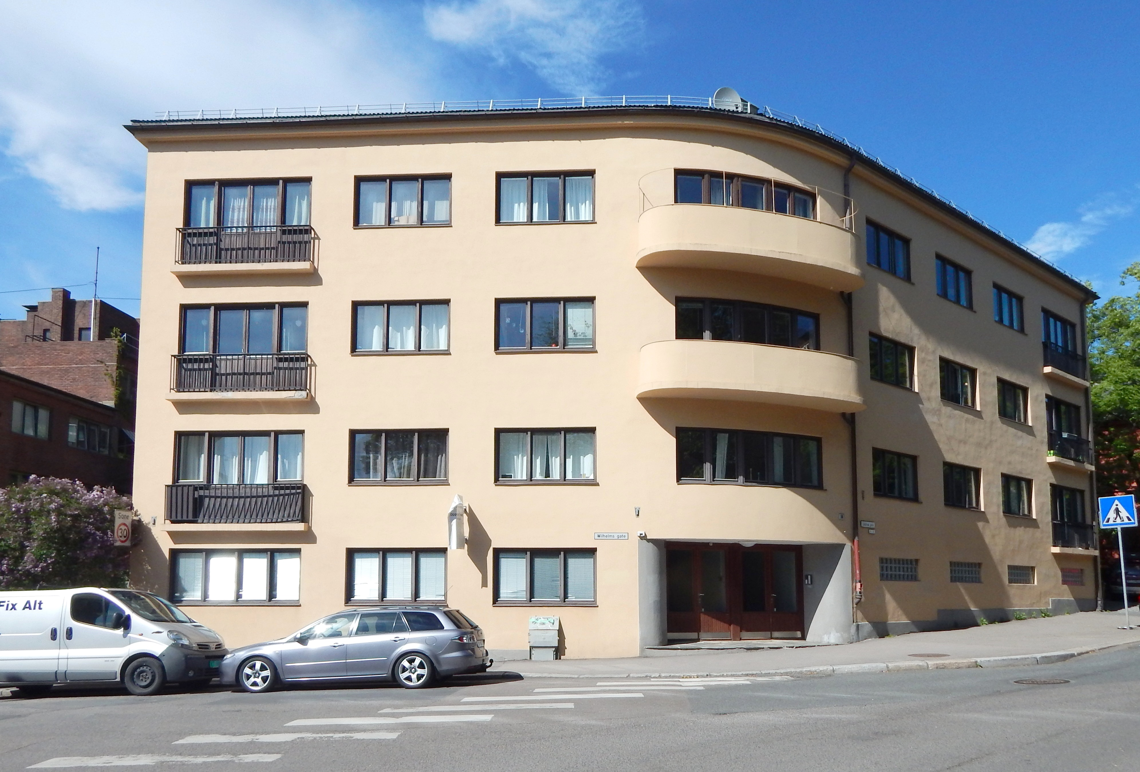 Wilhelms gate går til venstre for Louises gate 16. Arkitekter: Wilhelm Kielland og Arne Pedersen (1934).